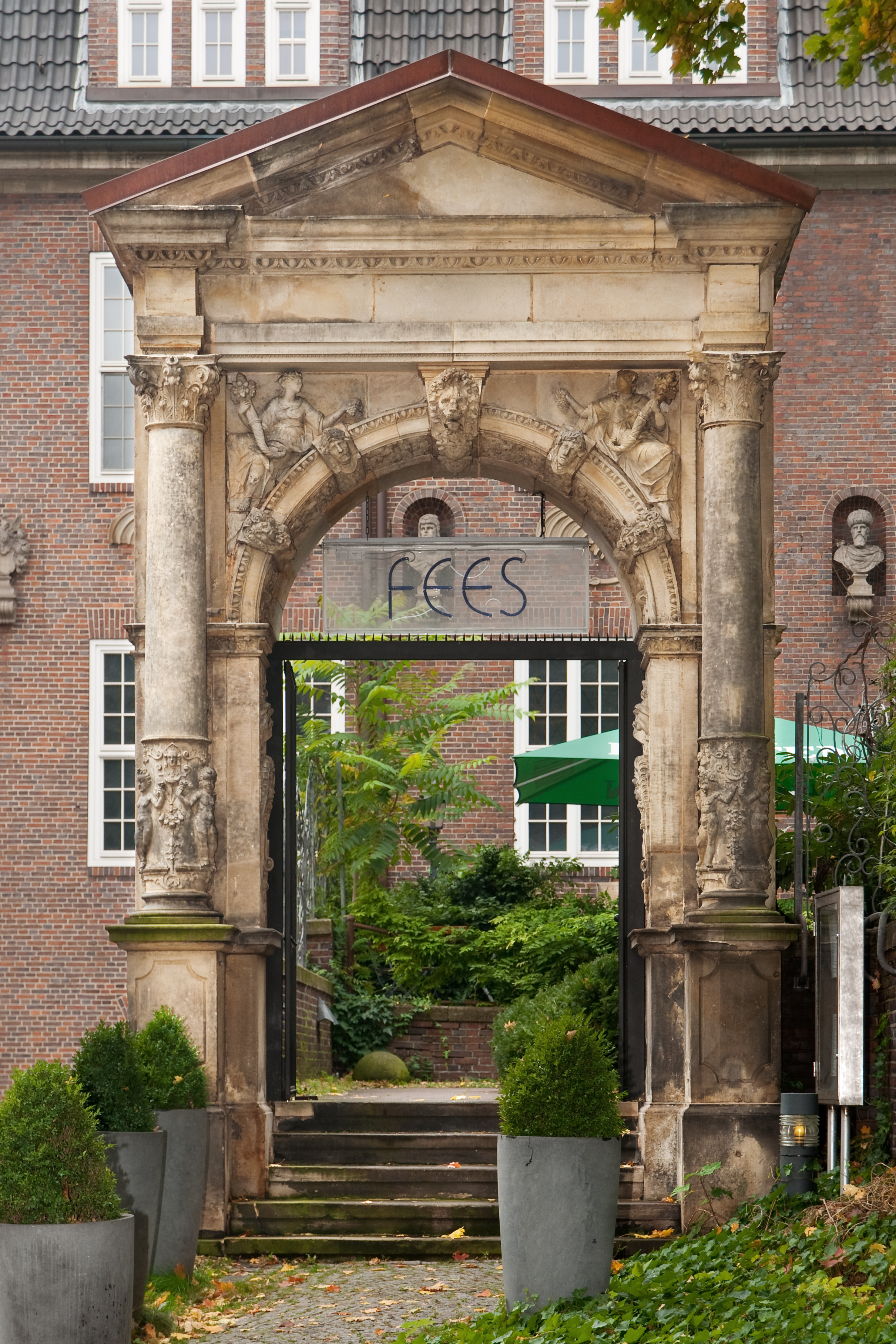 Portal des ehemaligen Hauses in Speersort 14, Hamburg.Standort: Eingang zur Terrasse des MuseumscafésHerkunft: Speersort 14Bemerkung: der Giebel wurde bei der Aufstellung aufgesetztZustand: Deutliche Mängel (Risse, Verwitterung, Verfärbungen)Zugangsdatum: 1910Erwerbsnotiz: Überwiesen von der BaudeputationVorbesitzer: Baudeputation Hamburg